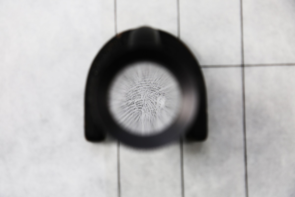 Vue d'une empreinte digitale